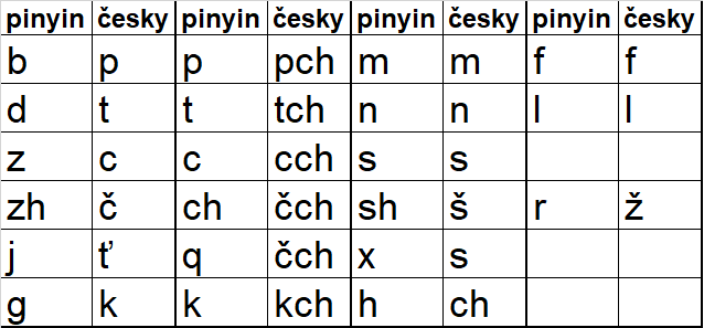 Iniciály v Čínštině, přepis pinyin - český